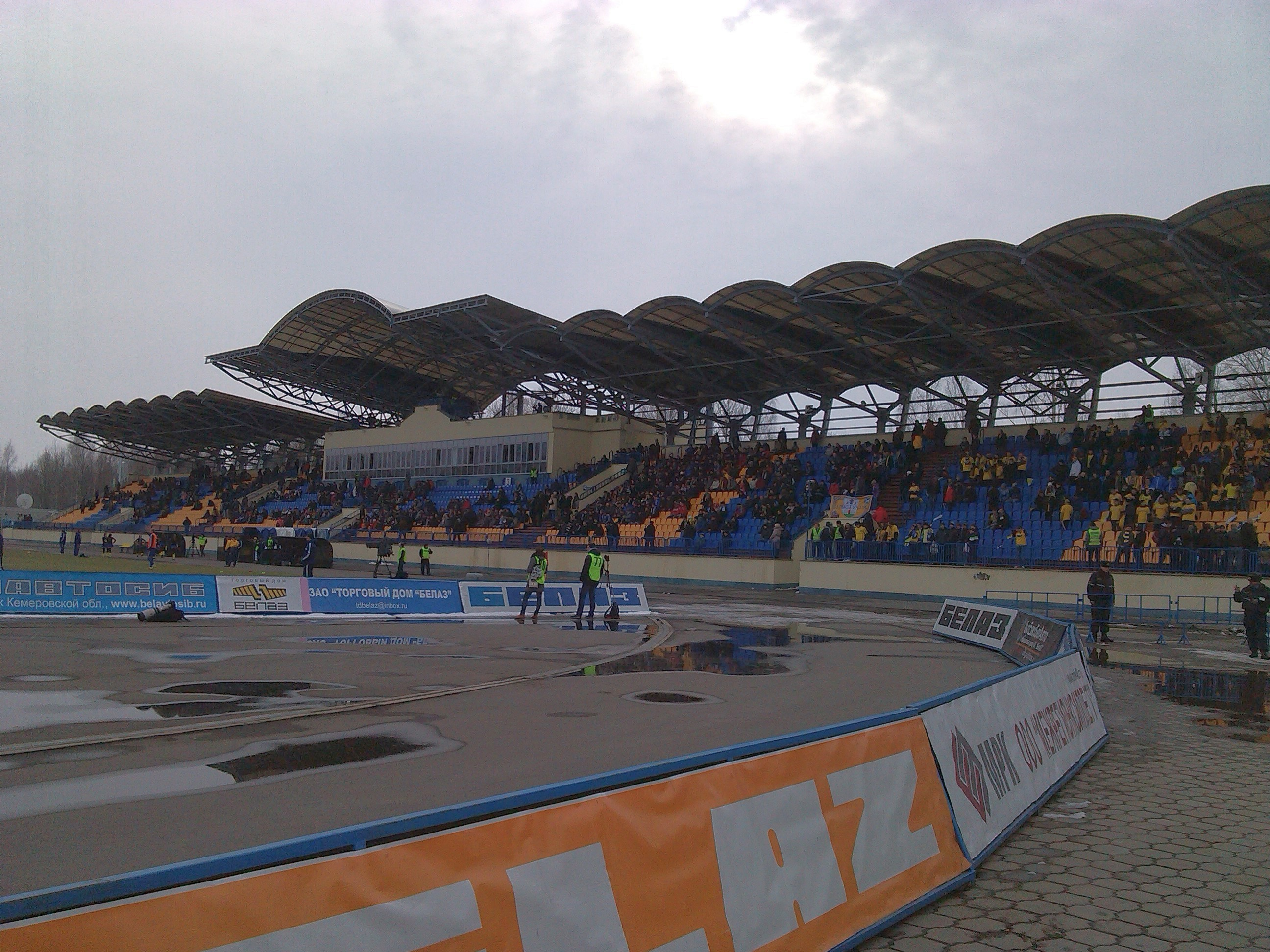 Западная трибуна стадиона "Торпедо", Жодино, Беларусь